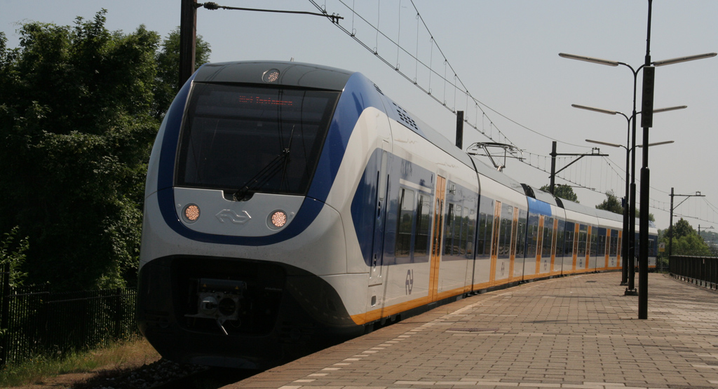 Sprinter SLT S100 passeert station Amsterdam Amstel.